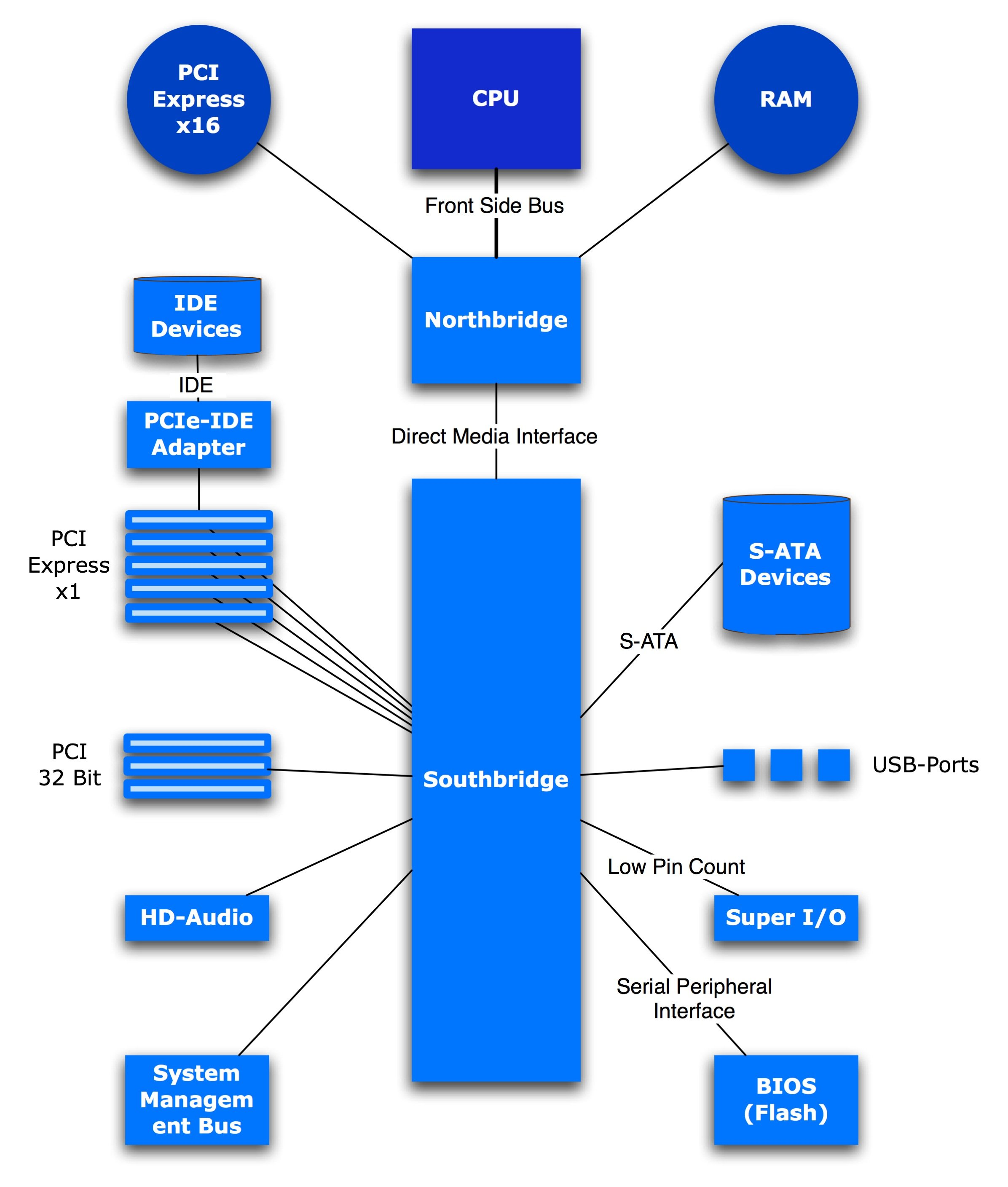 Typischer Intel Chipsatz mit North- und Southbridge.